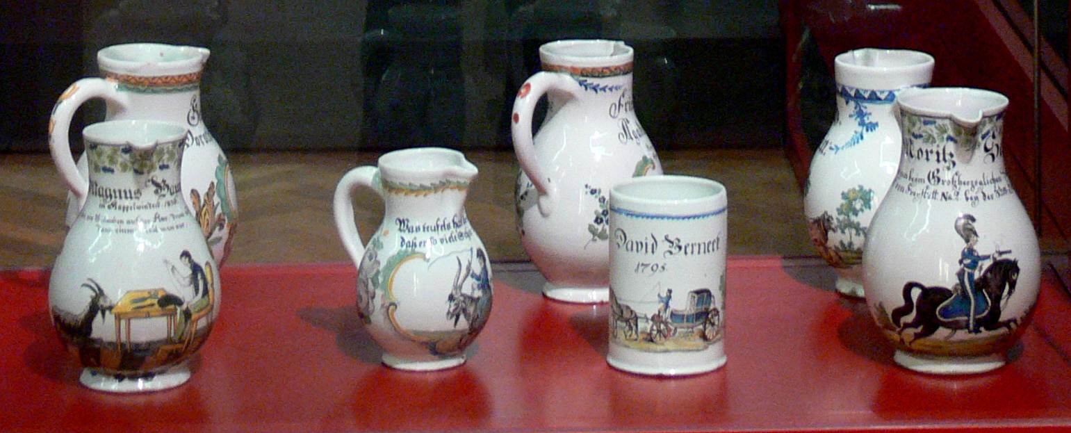 Durlacher Fayence Gallery: Reiss-Engelhorn-Museen, Mannheim